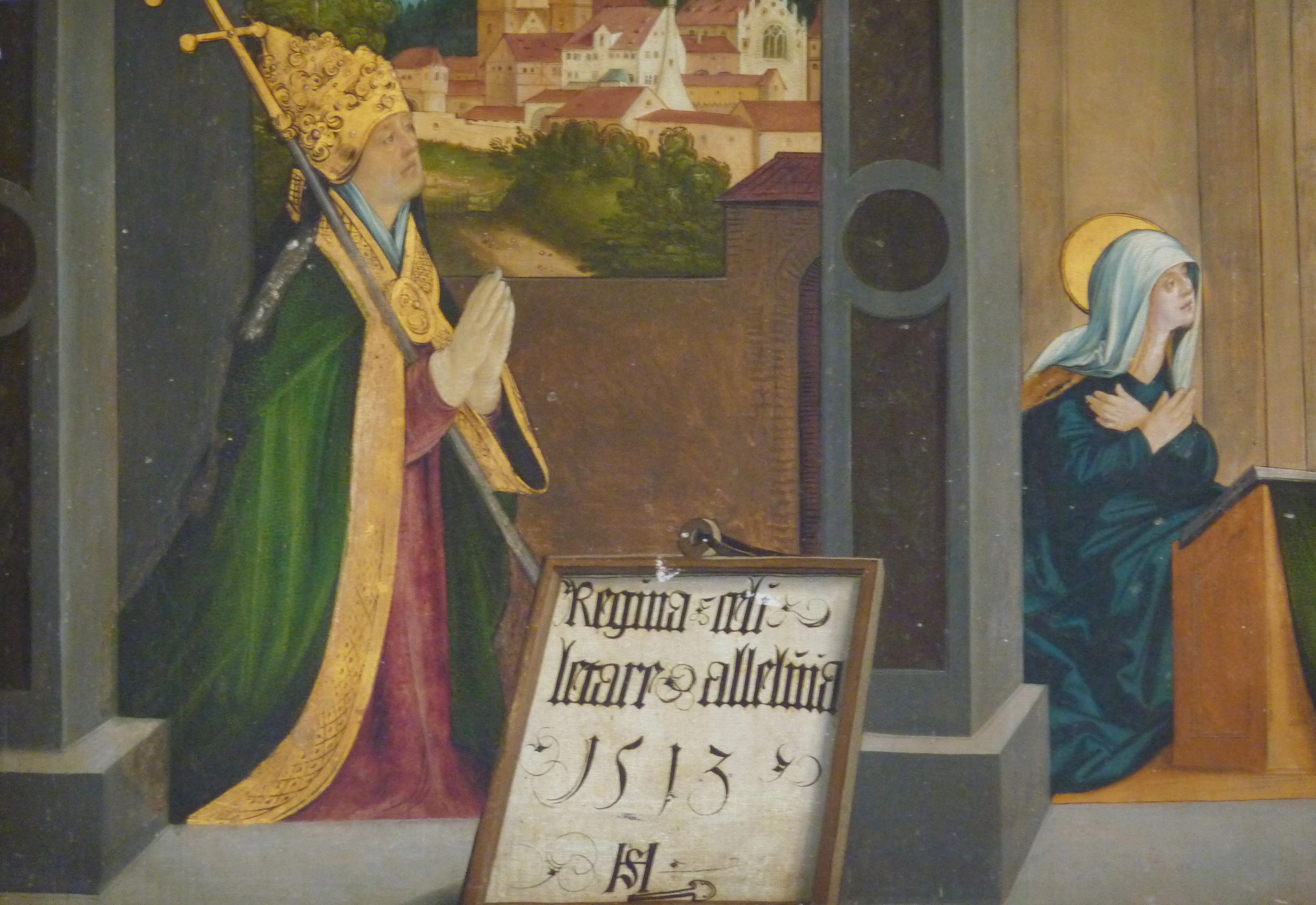 Evangelische Pfarrkirche, ehemalige Benediktinerklosterkirche St. Maria in Auhausen im Landkreis Donau-Ries (Bayern), Hochaltar (Flügelaltar) von Hans Schäufelin und Sebastian Daig von 1513; Darstellung (Predella, zweite Tafel von links): Papst und Kloster im Hintergrund, Tafel mit Inschrift „regina coeli letare alleluia“, Jahreszahl 1513 und Monogramm H.S. (Hans Schäufelin)